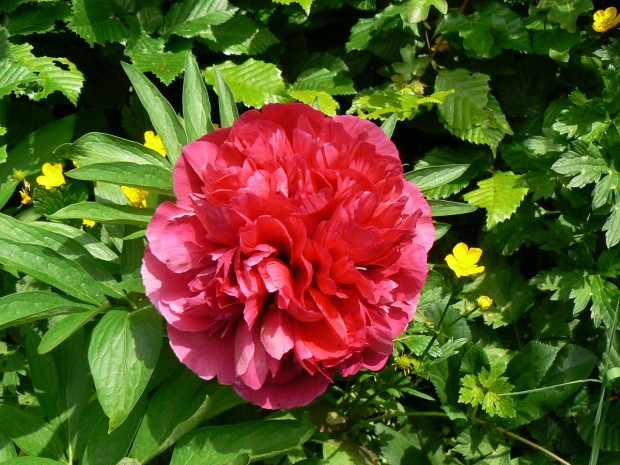 Paeonia × festiva 'Rubra Plena'